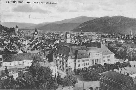 Synagoge und jüdisches Gemeindehaus, Freiburg. 1913